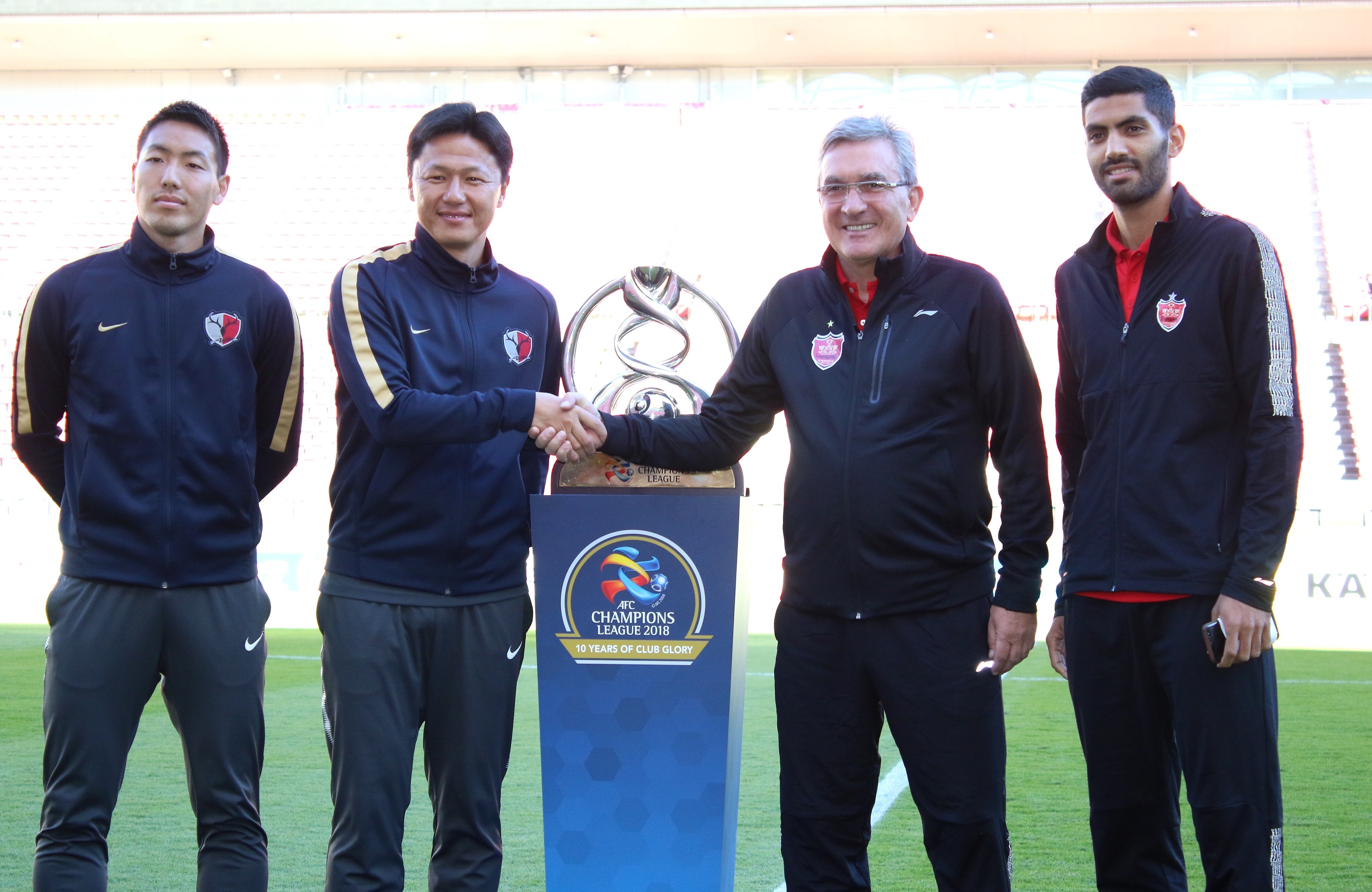 تمرین تیم فوتبال پرسپولیس، پیش از مسابقه نخست فینال لیگ قهرمانان آسیا ۲۰۱۸